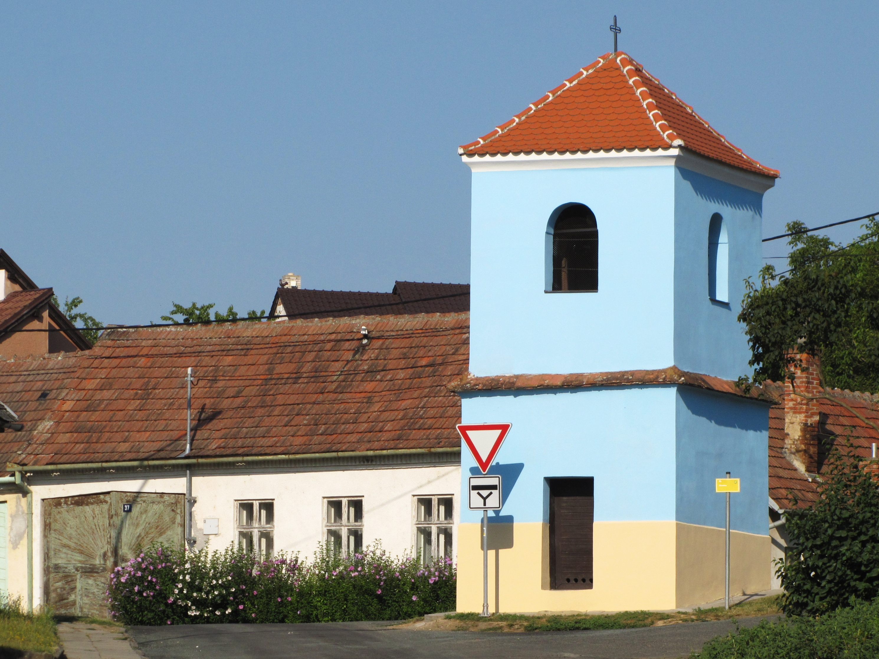 Zvonice z roku 1854 v Čeložnicích